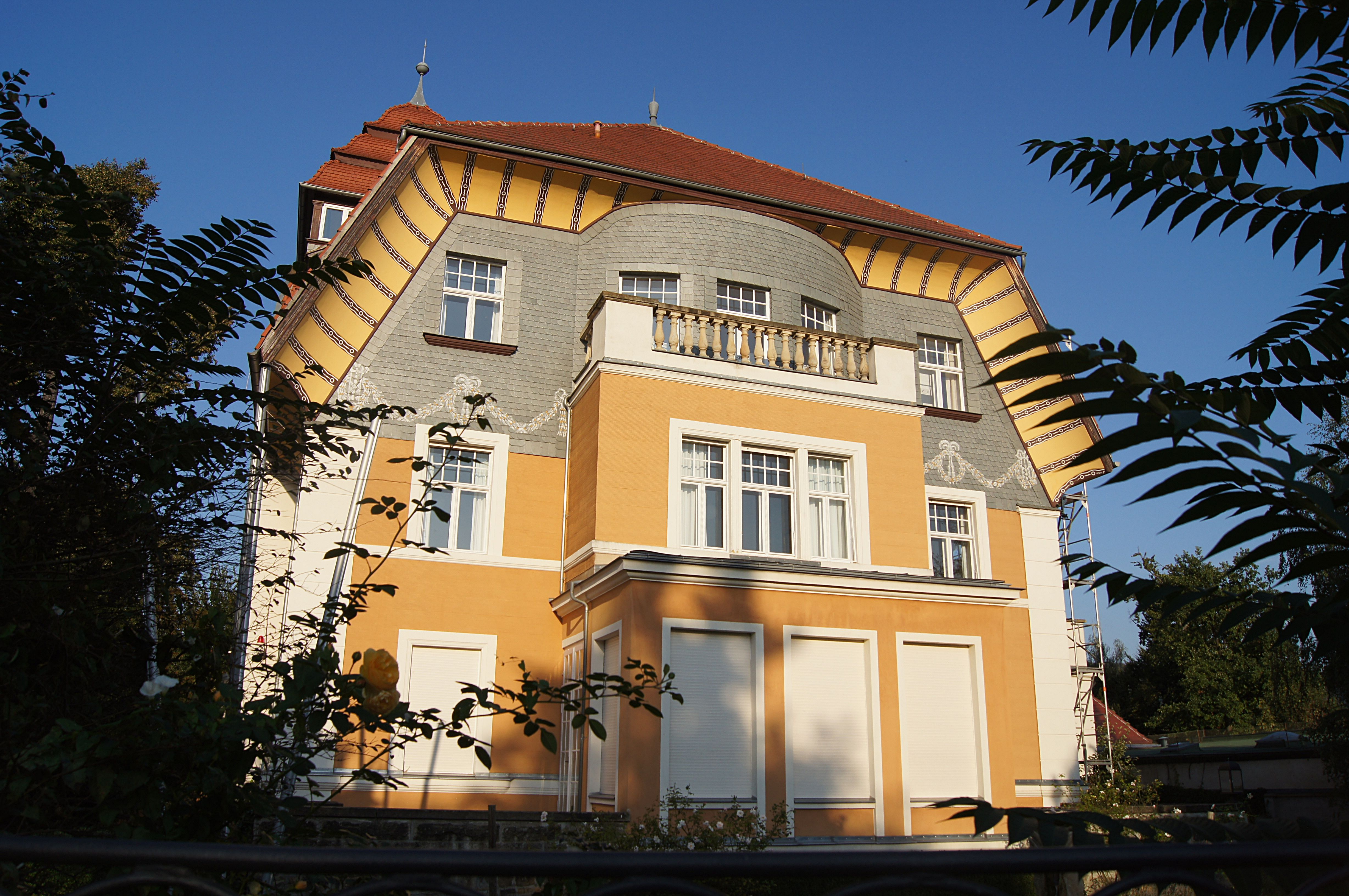 Dresden-Blasewitz, ehemaliges Wohnhaus Reinhold-Becker-Straße 5 (Eckgrundstück zur Tolkewitzer Straße); erbaut 1905-1906 von Baumeister Max Große; heute Sitz der Brücke/Most-Stiftung